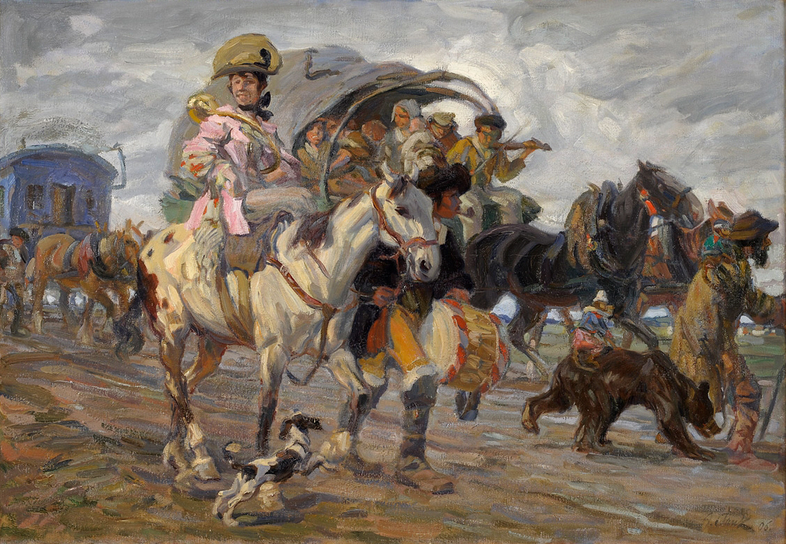 Der Wanderzirkus